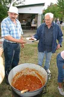 Az esti program előtt Suchman Tamás tálalja a saját maga főzte vacsorát Jancsó Miklósnak - Szárszói Találkozó 2003